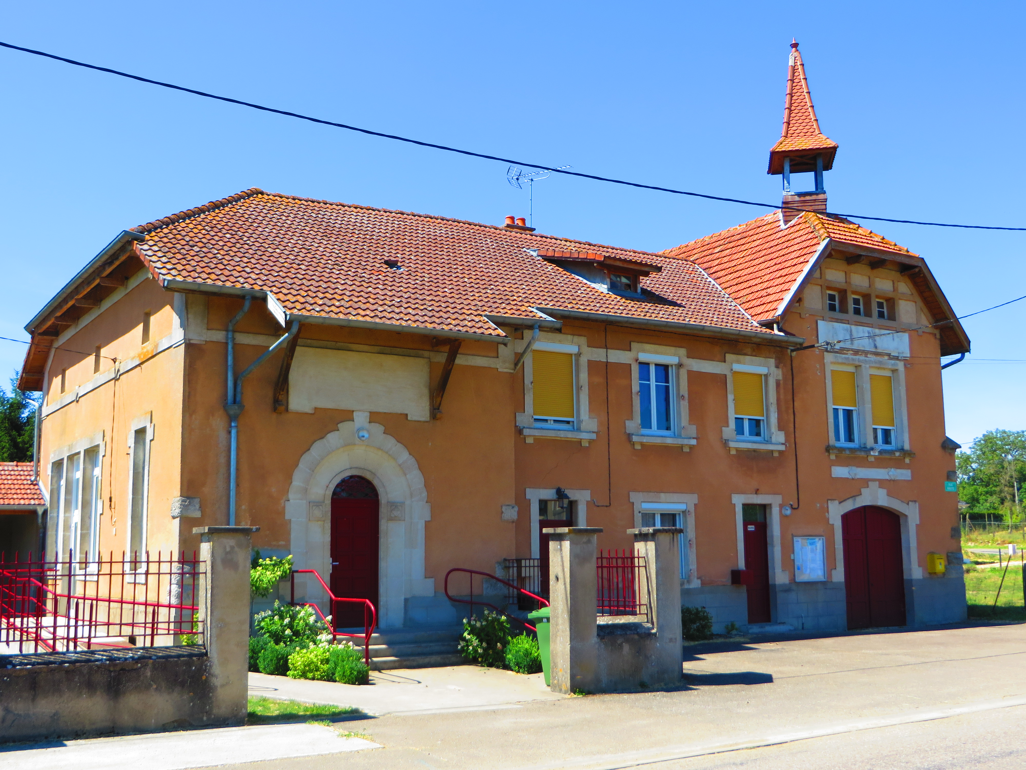 Moranville La mairie